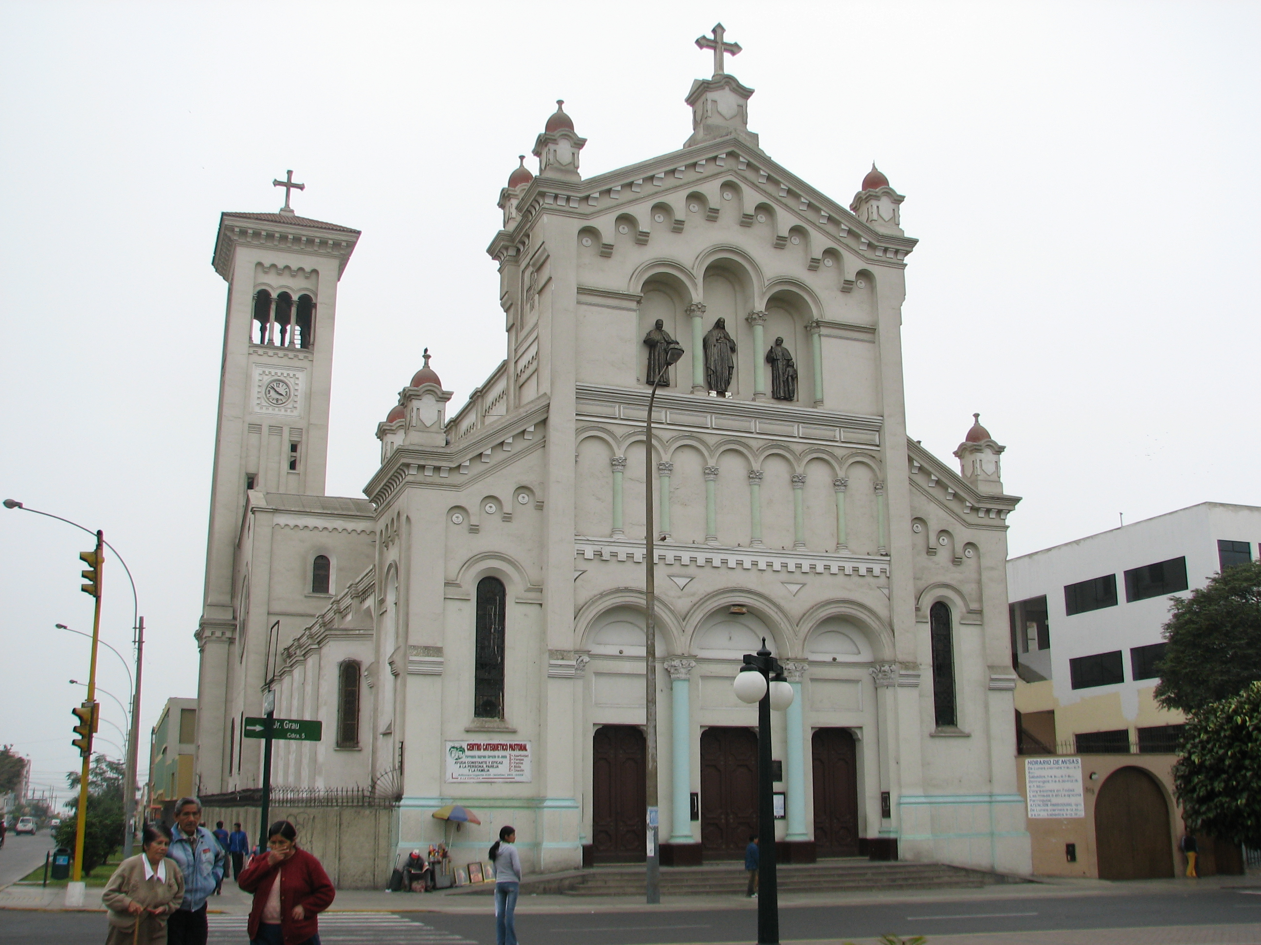 Church in Magdalena del Mar district, Lima, Peru